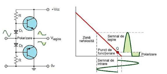 schema electrica si reprezentare grafica a unui amplificator in clasa AB